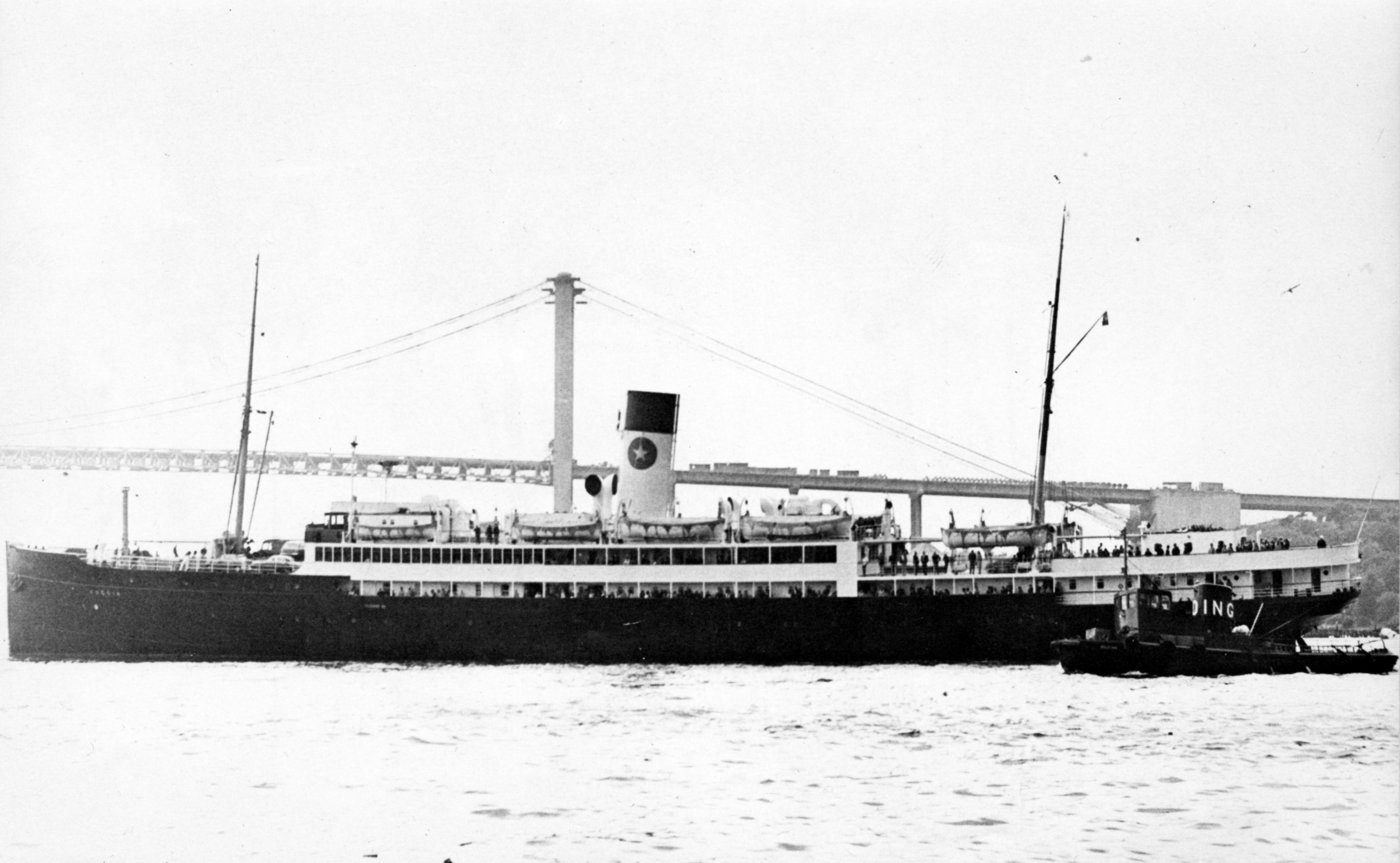 SS Suecia på väg till London med Älvsborgsbron i bakgrunden